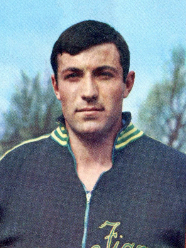 CAMPIONI DELLO SPORT 1968/69 - n. 2 - S. SIMEON -ITA